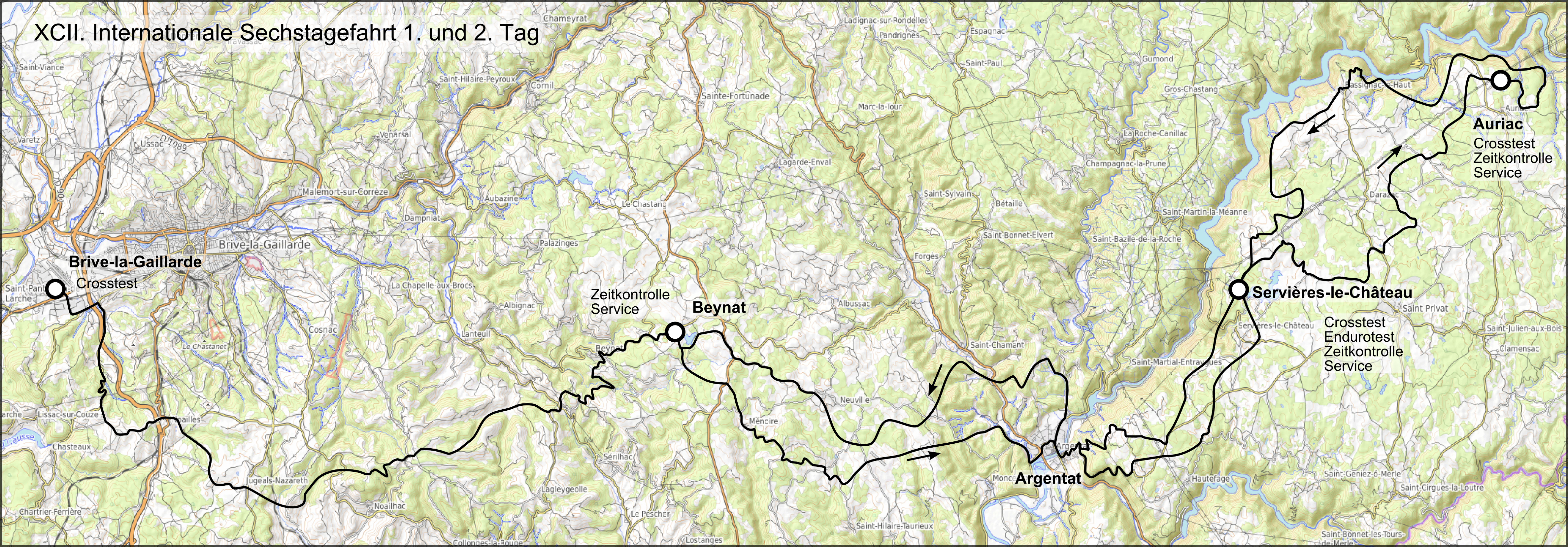 Karte der 92. Internationale Sechstagefahrt, Route des 1. und 2. Tages